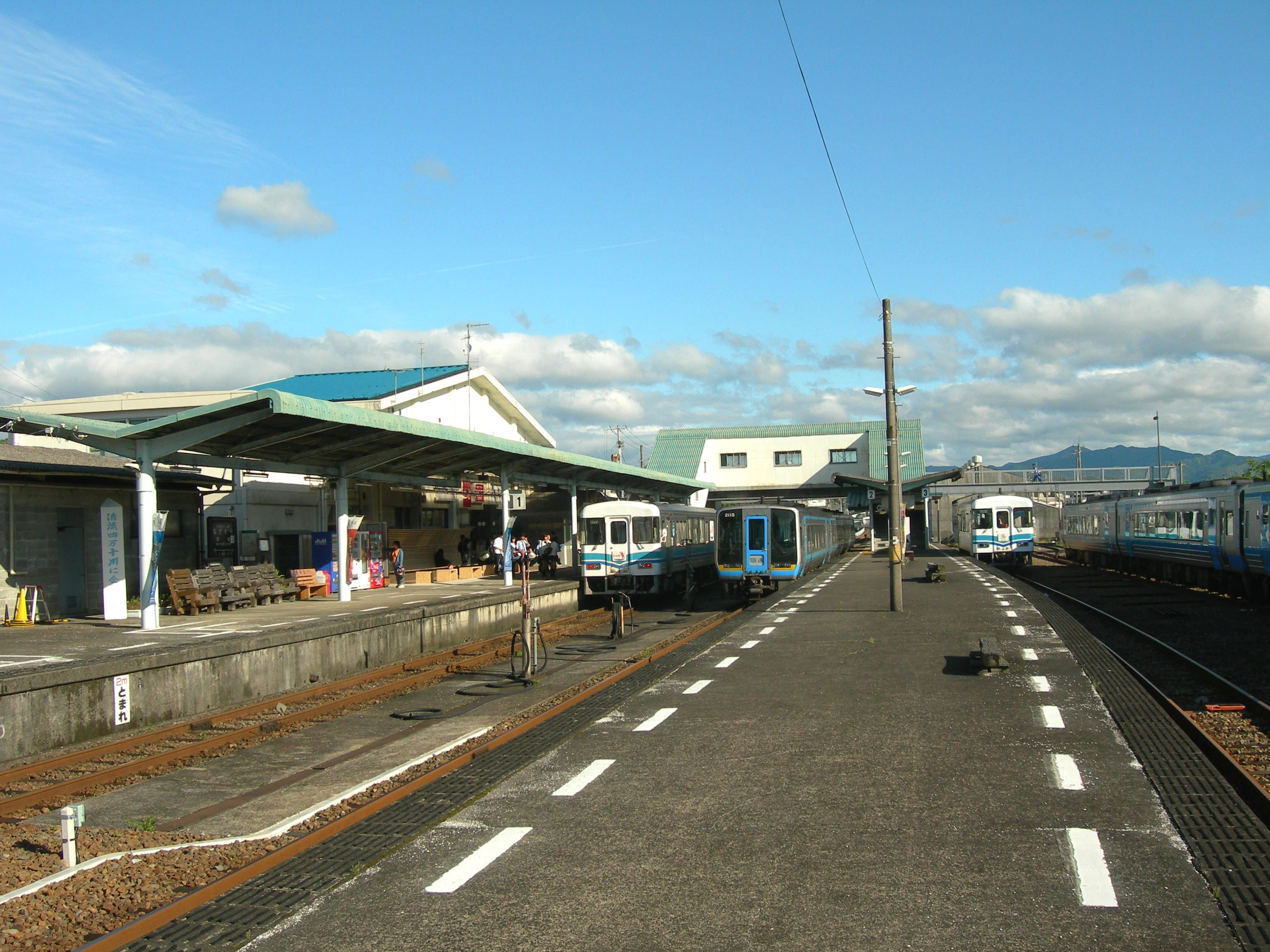 中村駅ホーム